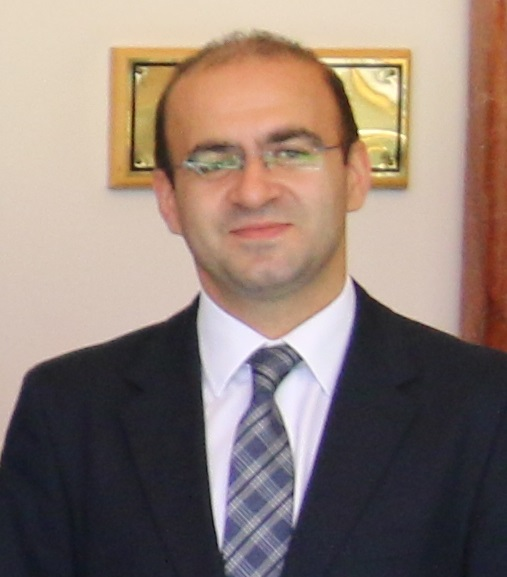 Taha Özhan